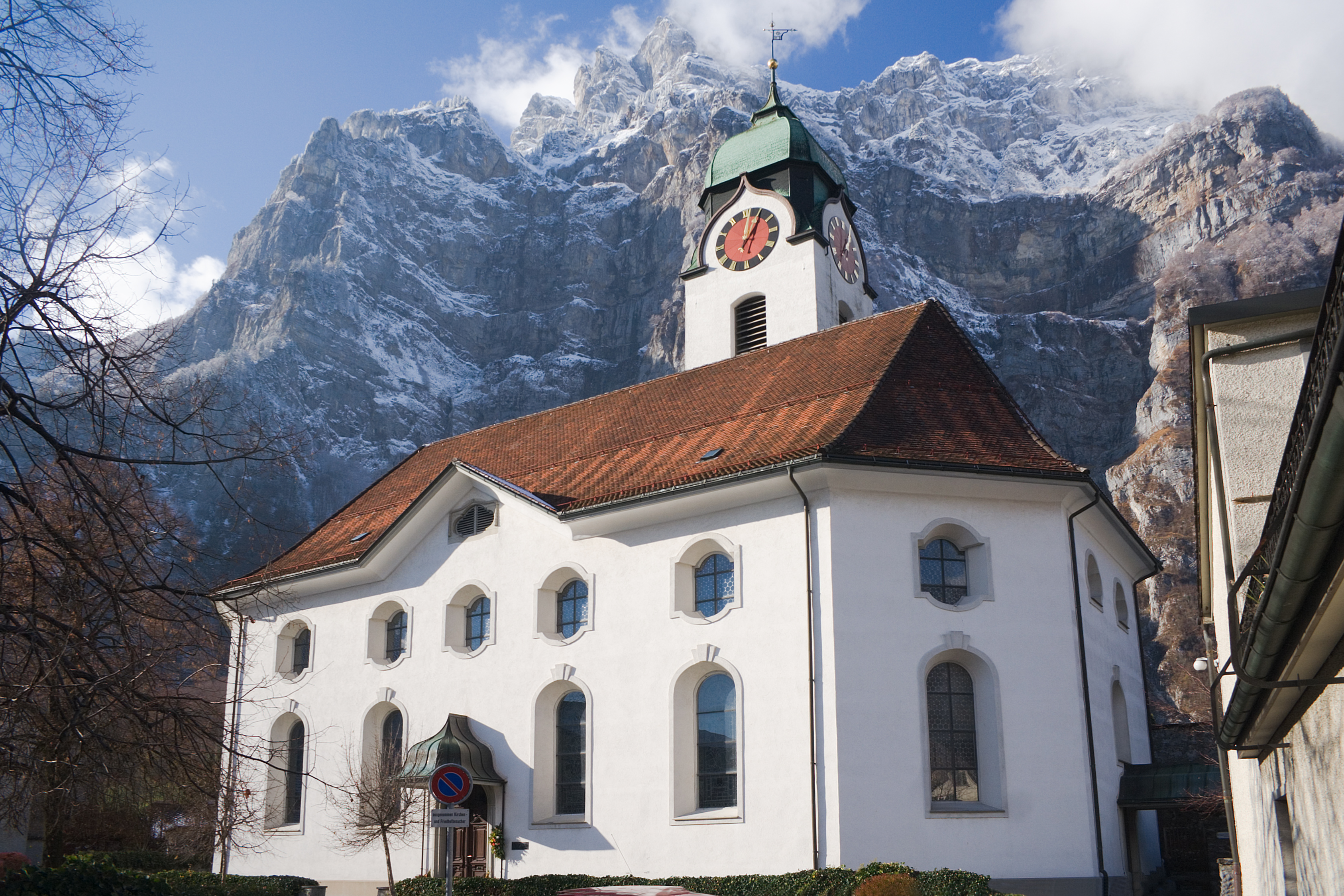 Reformierte Kirche Netstal, SchweizErbaut 1811, restauriert 1972, Denkmal des Kantons Glarus und des BundesIm Hintergrund der Berg Wiggis (2282 m. ü. M.)